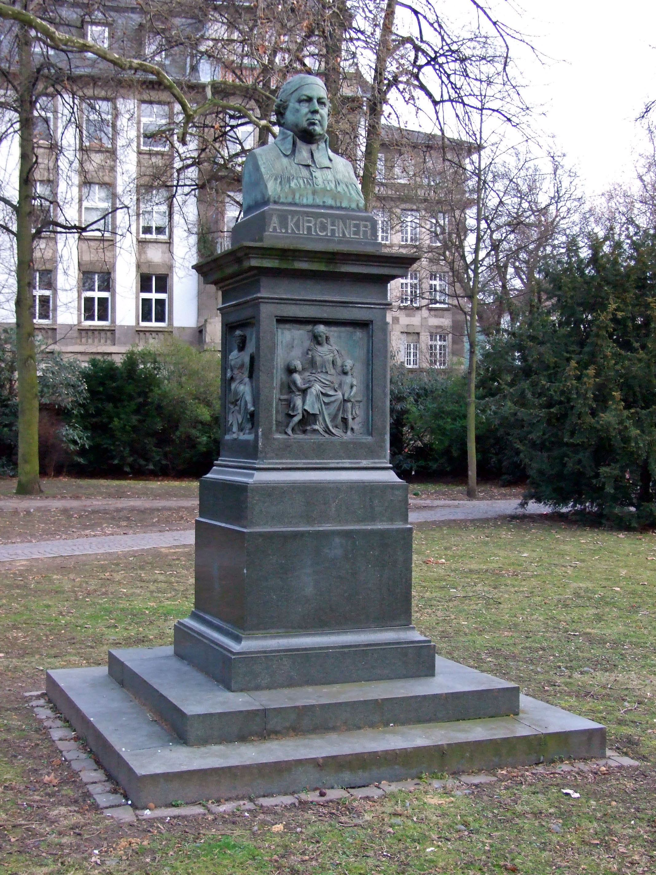 Kirchner-Denkmal auf der „Eschenheimer Anlage“ in Ffm, Naehe „Eckenheimer Landstrasse“